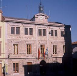 Ayuntamiento del concejo asturiano de Salas.